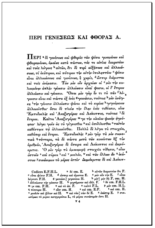 Aristotle: De generatione et corruptione, first page in Immanuel Bekker's edition, 1837.